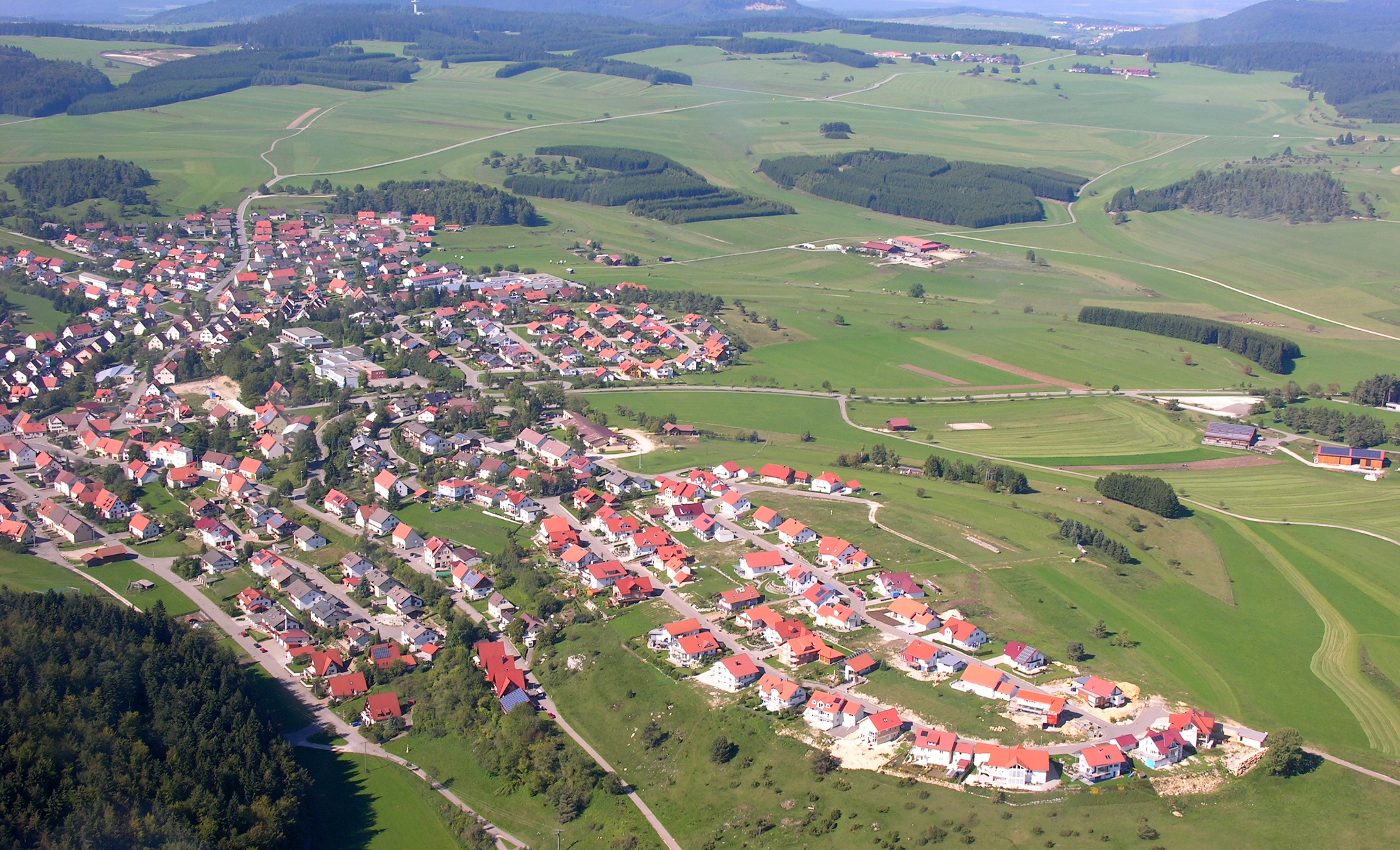 Germany, Baden-Württemberg, Aerial view of Böttingen